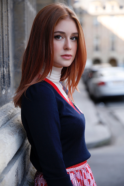 Marina